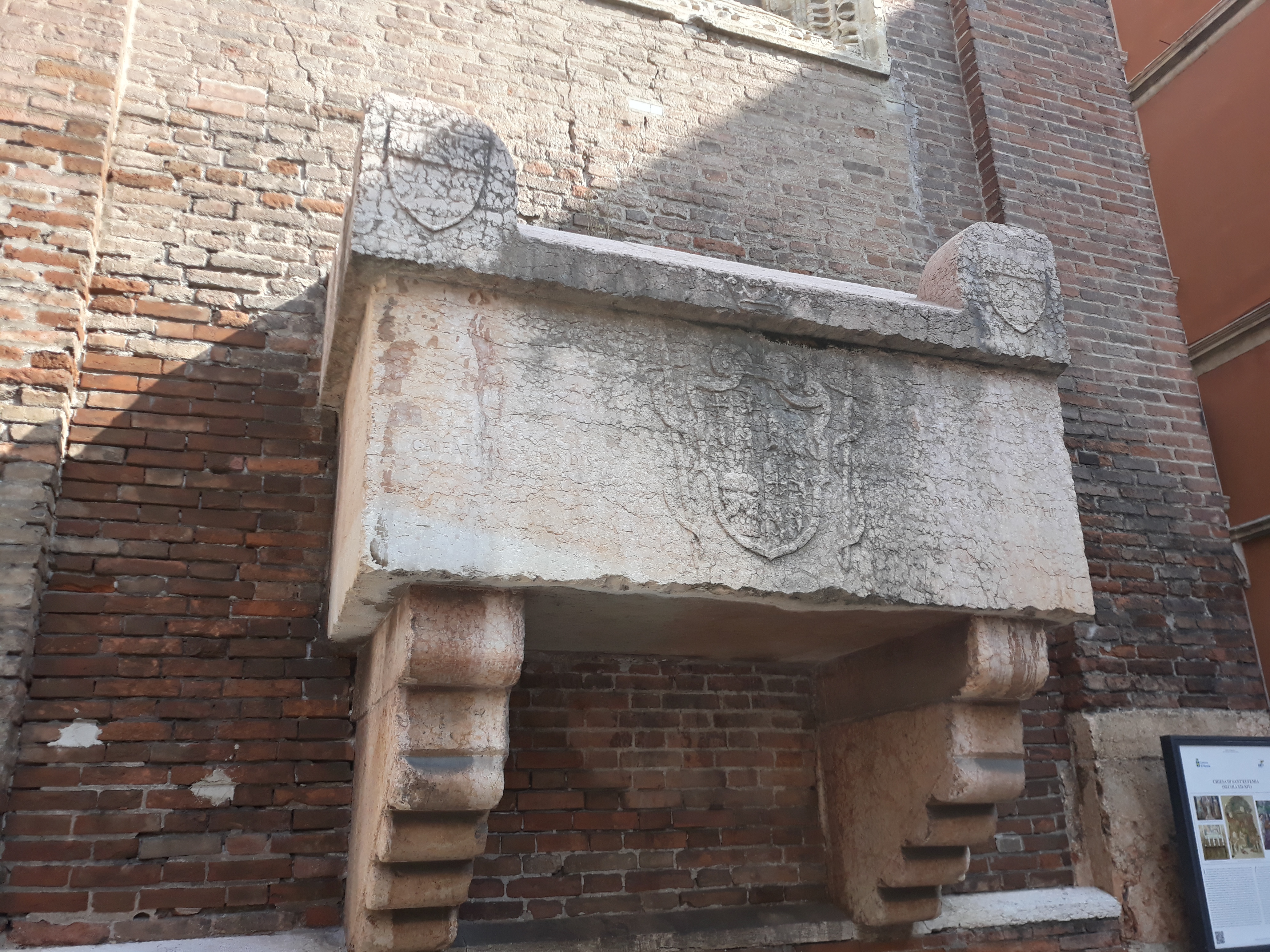 Chiesa di Sant'Eufemia (Verona). Sepolcro posto sulla facciata del nobile Cavalcan Calvacani morto nel 1279.